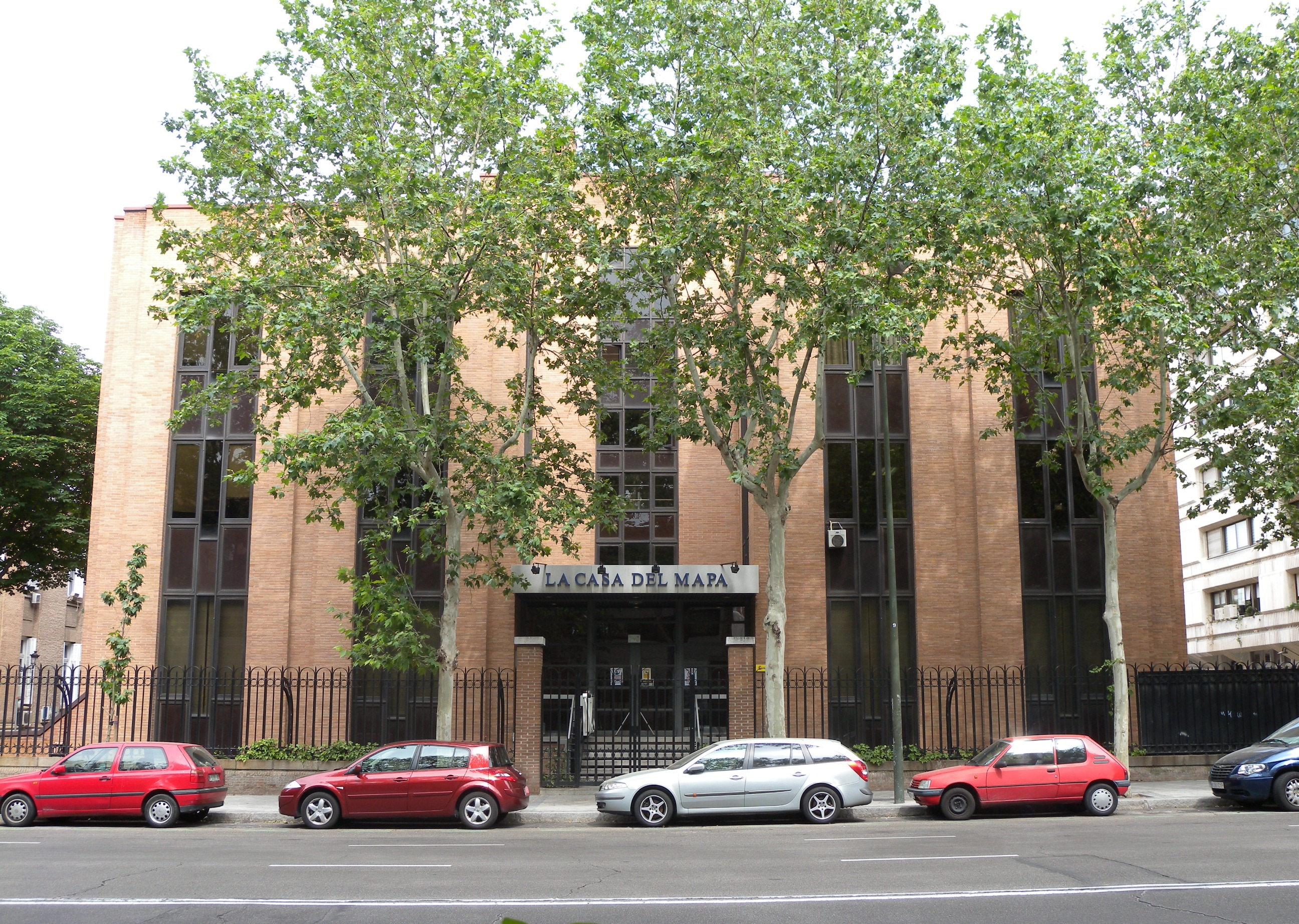 Instituto Geografico Nacional de España